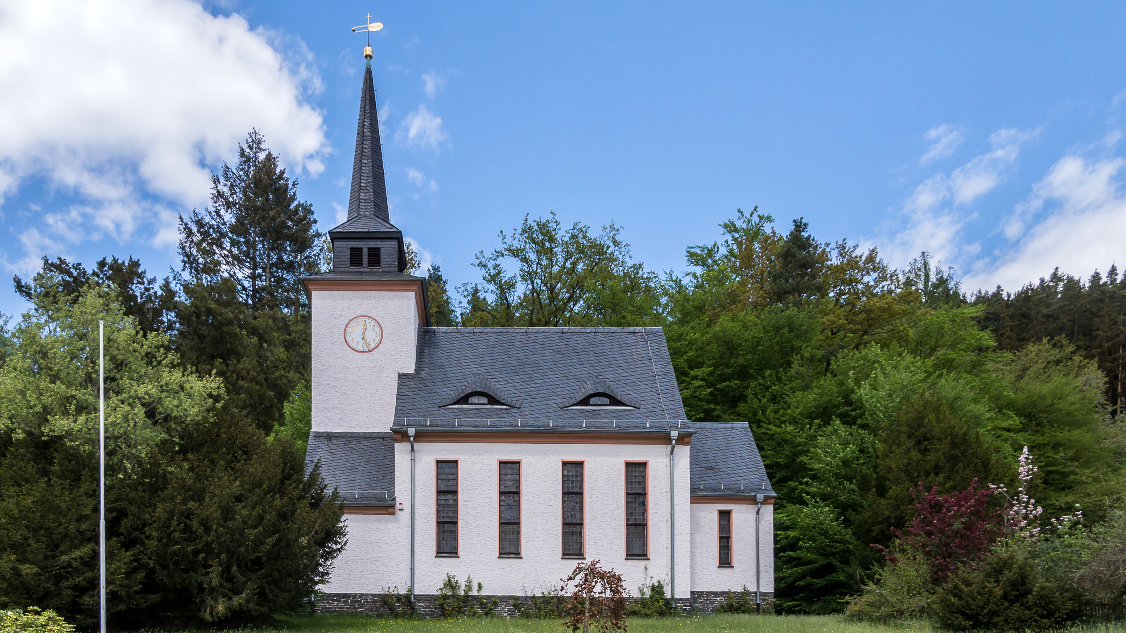 Hohenwarte Preßwitzer Straße 5 Kirche mit Ausstattung, Grundstück und Einfriedung Bestandteil Denkmalensemble "Siedlung Hohenwarte"